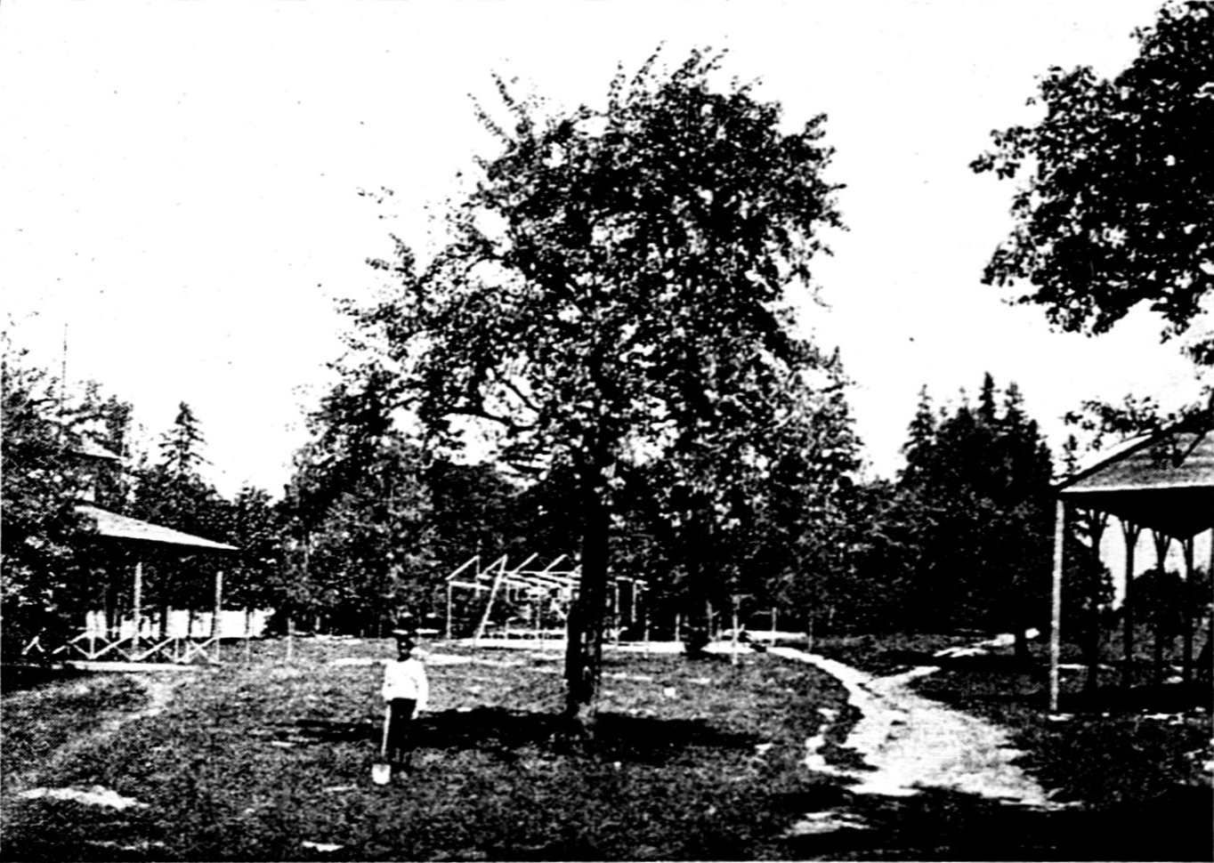 Беларуская (тарашкевіца): Менск (Miensk), Мескі Сад (Mieski Sad). Выстава сельскай гаспадаркі